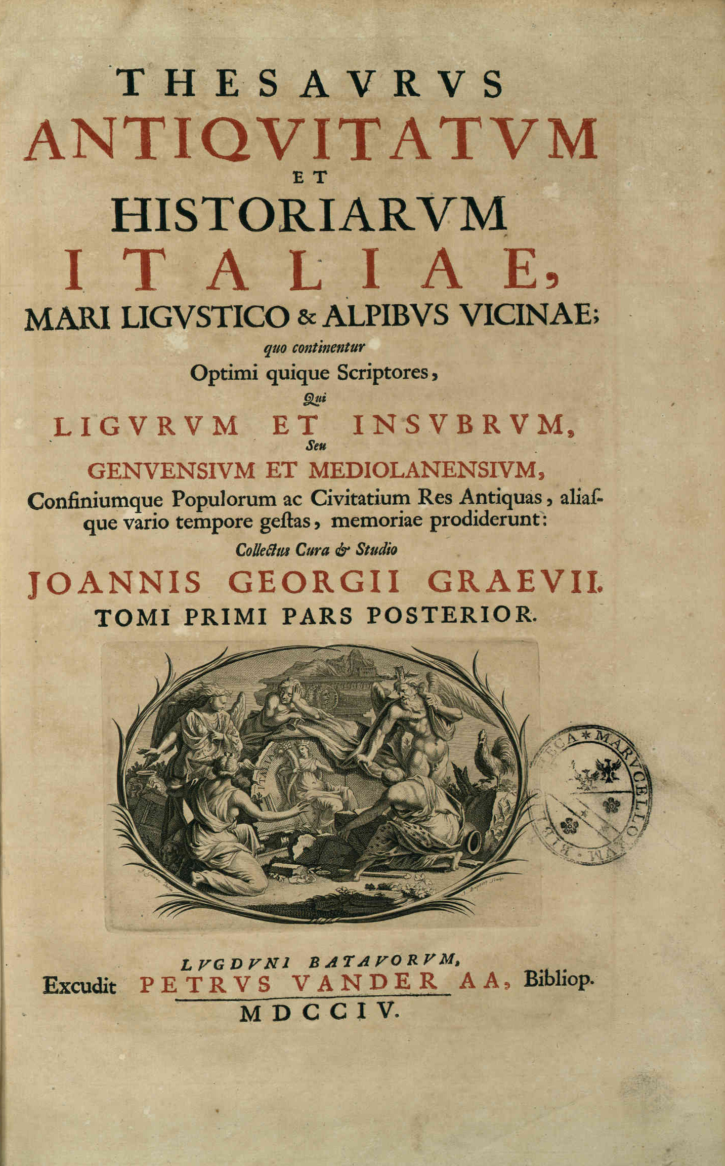 Thesaurus antiquitatum et historiarum Italiae, Neapolis, Siciliae, Sardiniae, Corsicae, Melitae atque adjacentium terrarum insularumque ... digeri atque edi olim coeptus cura & studio Joannis Georgii Graeuii nunc autem continuatus & ad finem perductus cum praefationibus Petri Burmanni ... comprehensus voluminibus 45 interferuntur passim variae & accuratae tabulae tam geographicae quam aliae ut & indices ad singulos ubique libros locupletissimi ... 1.2. - Lugduni Batauorum : excudit Petrus Vander Aa bibliopola, urbis atque Academiae typographus ordinarius, 1704. - [15] p., col. 763-1514, [38] p., [1] pianta ripiegata . Frontespizio